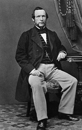 Herman Sätherberg